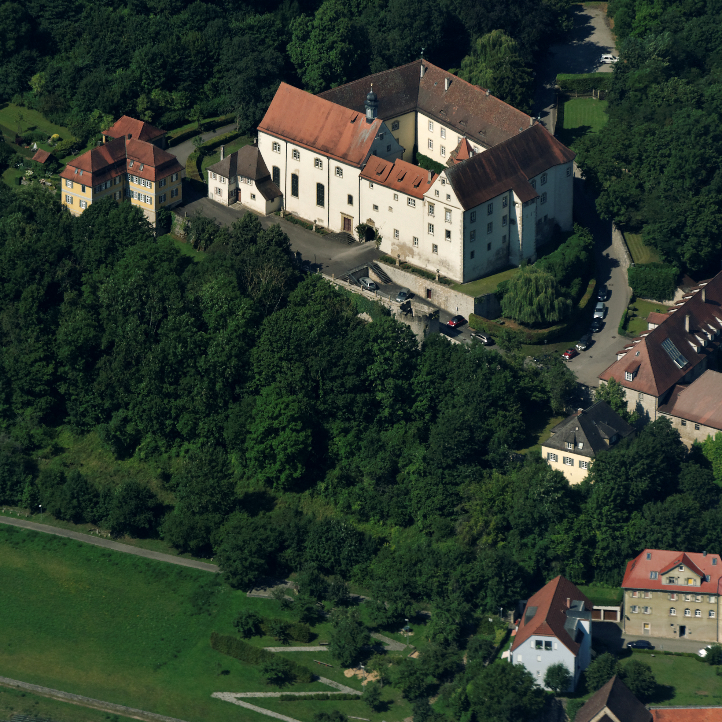 Niederstetten aus dem Flugzeug gesehen.